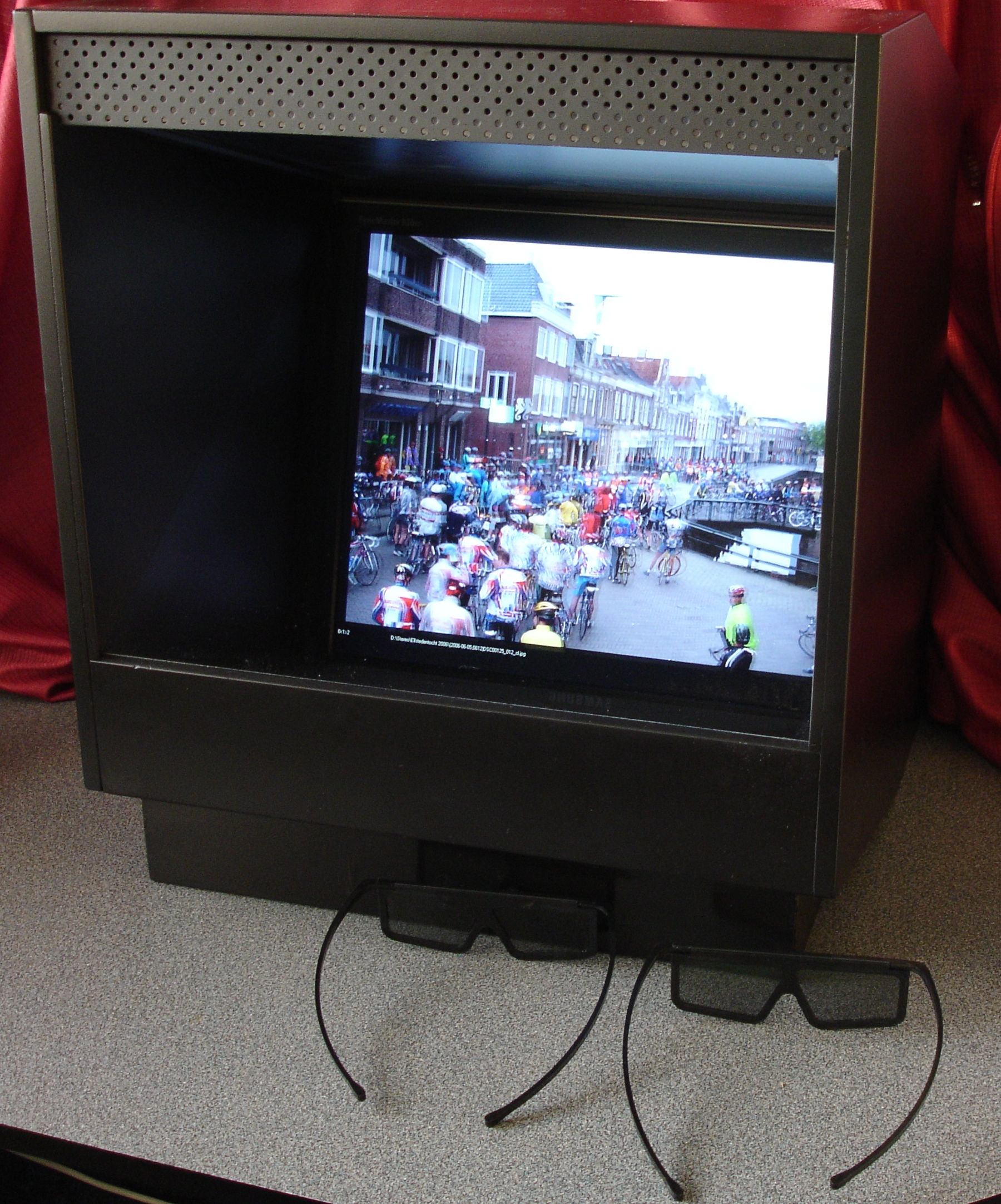 Cobox